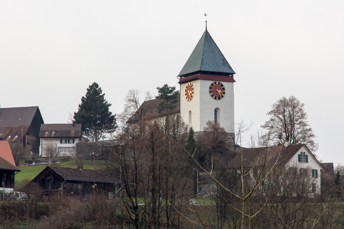 Reformierte Kirche Illnau, von der Soorhalde aus gesehen